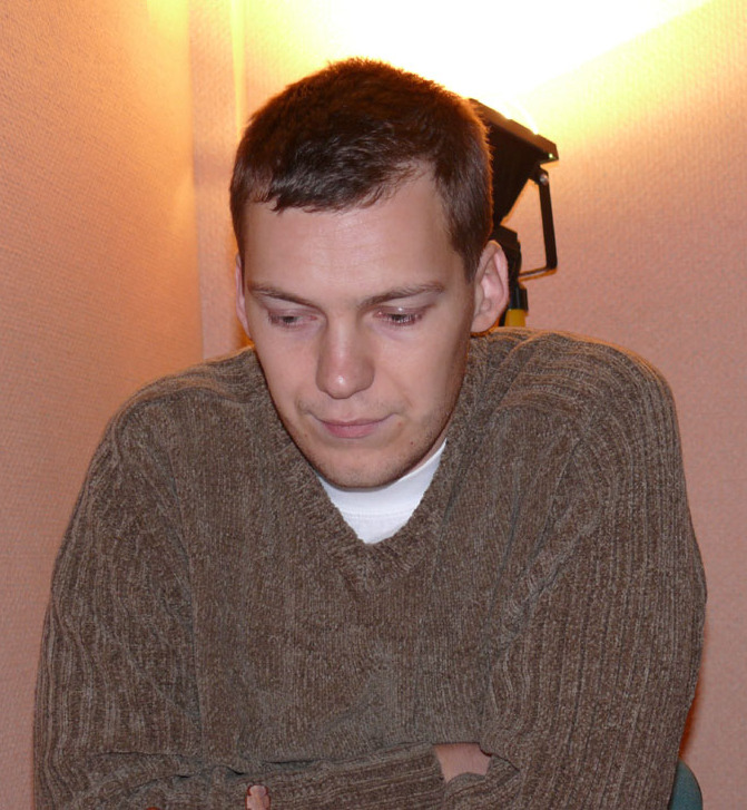 Rafał Antoniewski, Wysowa 2007